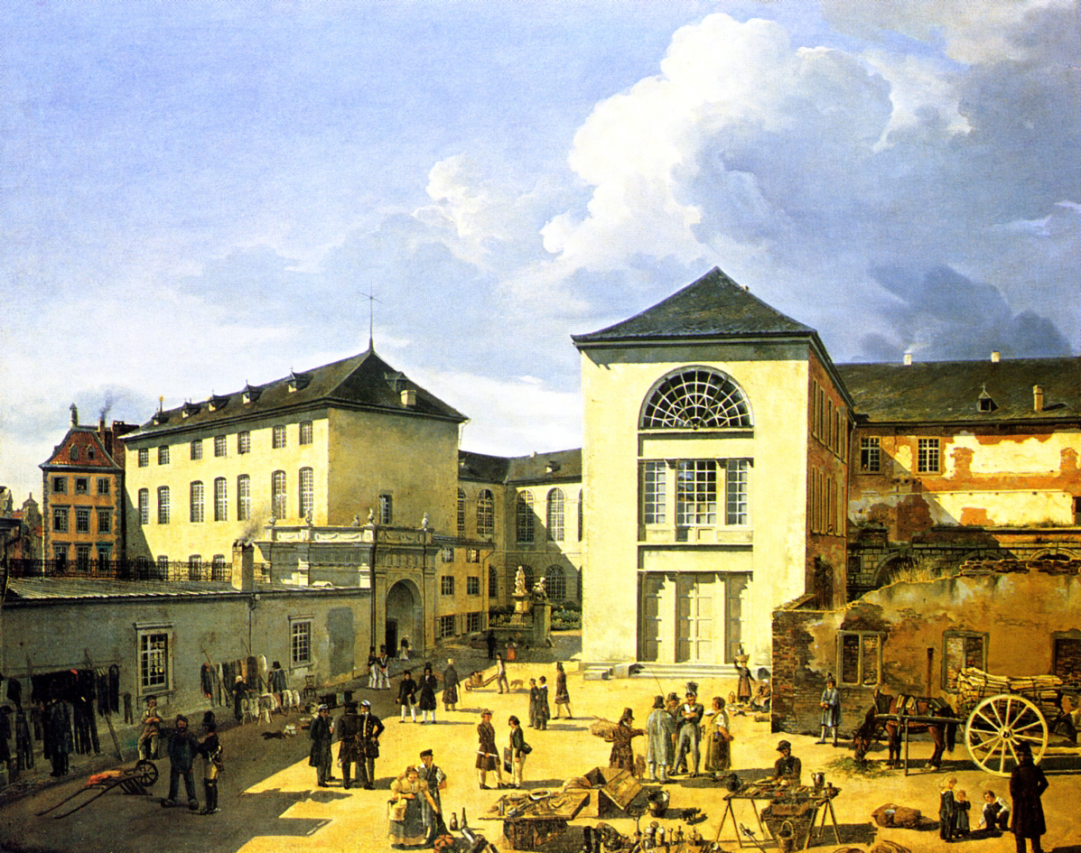 Die Kunstakademie befand sich von 1821 bis zum Brand 1872 im ehemaligen Galeriegebäude des Kurfürstlichen Schlosses. Im Erdgeschoss waren die Bibliothek, Wohnungen und Arbeitsräume untergebracht. Die Ateliers der Professoren befanden sich im ersten Obergeschoss. Weitere Arbeitsräume und der Raum der Landschaftsklasse lagen im zweiten Obergeschoss. Der sechzehnjährige Akademieschüler Andreas Achenbach malte das Ölgemälde 1831 innerhalb von zwei Monaten vom Fenster seiner elterlichen Wohnung aus. Er hat sich selbst in Mitte des Vordergrundes mit einer Zeichenrolle abgebildet.